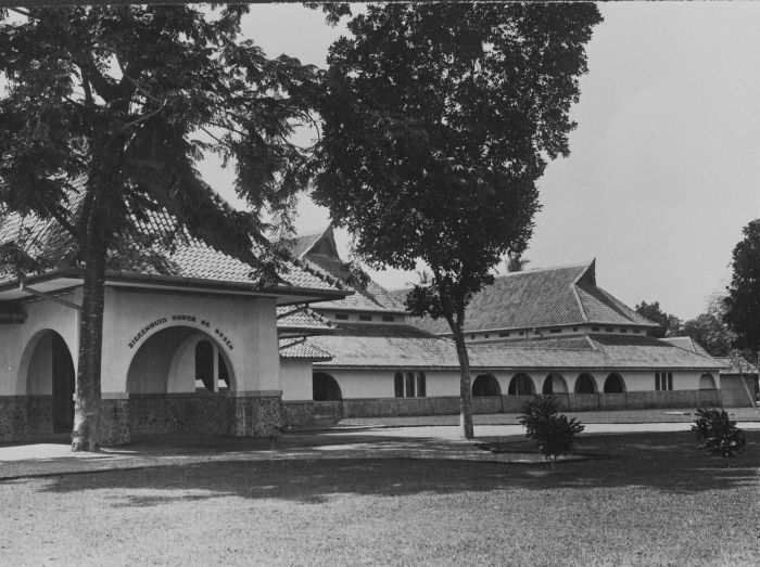 foto. Het Christelijke ziekenhuis Onder de Bogen